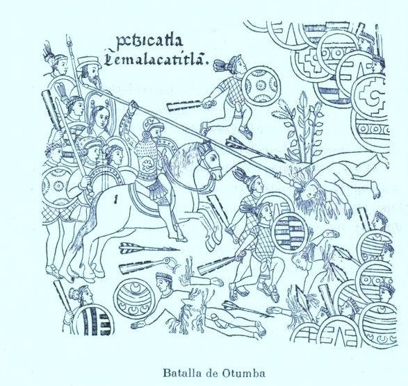 Representación de la batalla de Otumba en el Lienzo de Tlaxcala, la cual se llevó a cabo en Temalacatitlán.